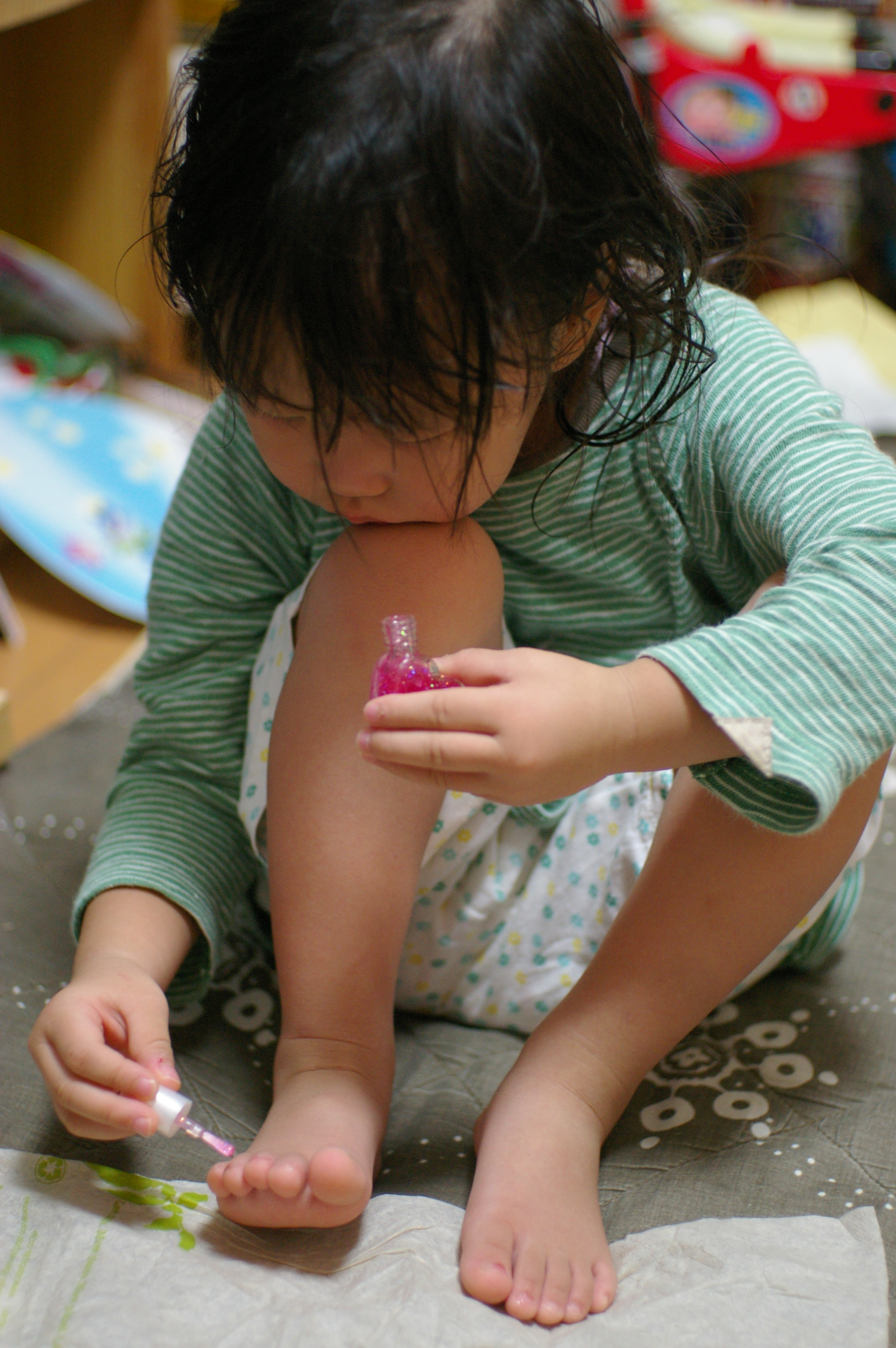 ３さいともなればおしゃれもしたくなるさ！